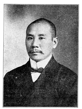 中華民國國會議員